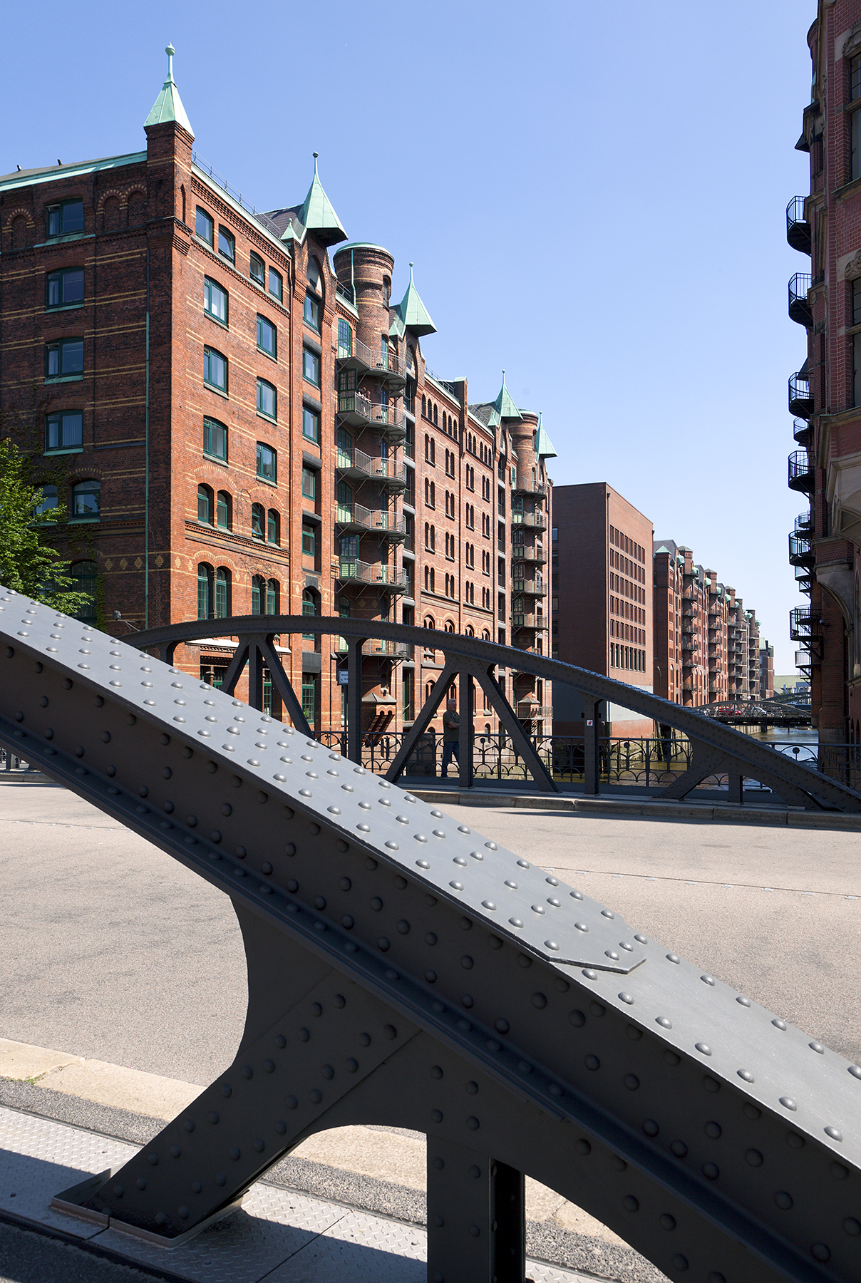 Blick von der Straße Bei St. AnnenThis is a photograph of an architectural monument.